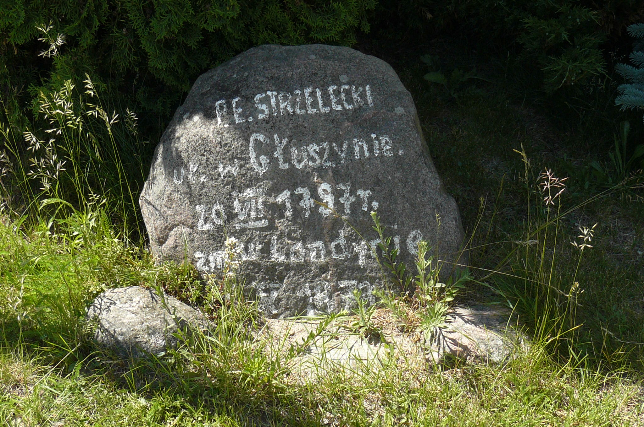 Pomnik P.E. Strzeleckiego - Poznań, Głuszyna.